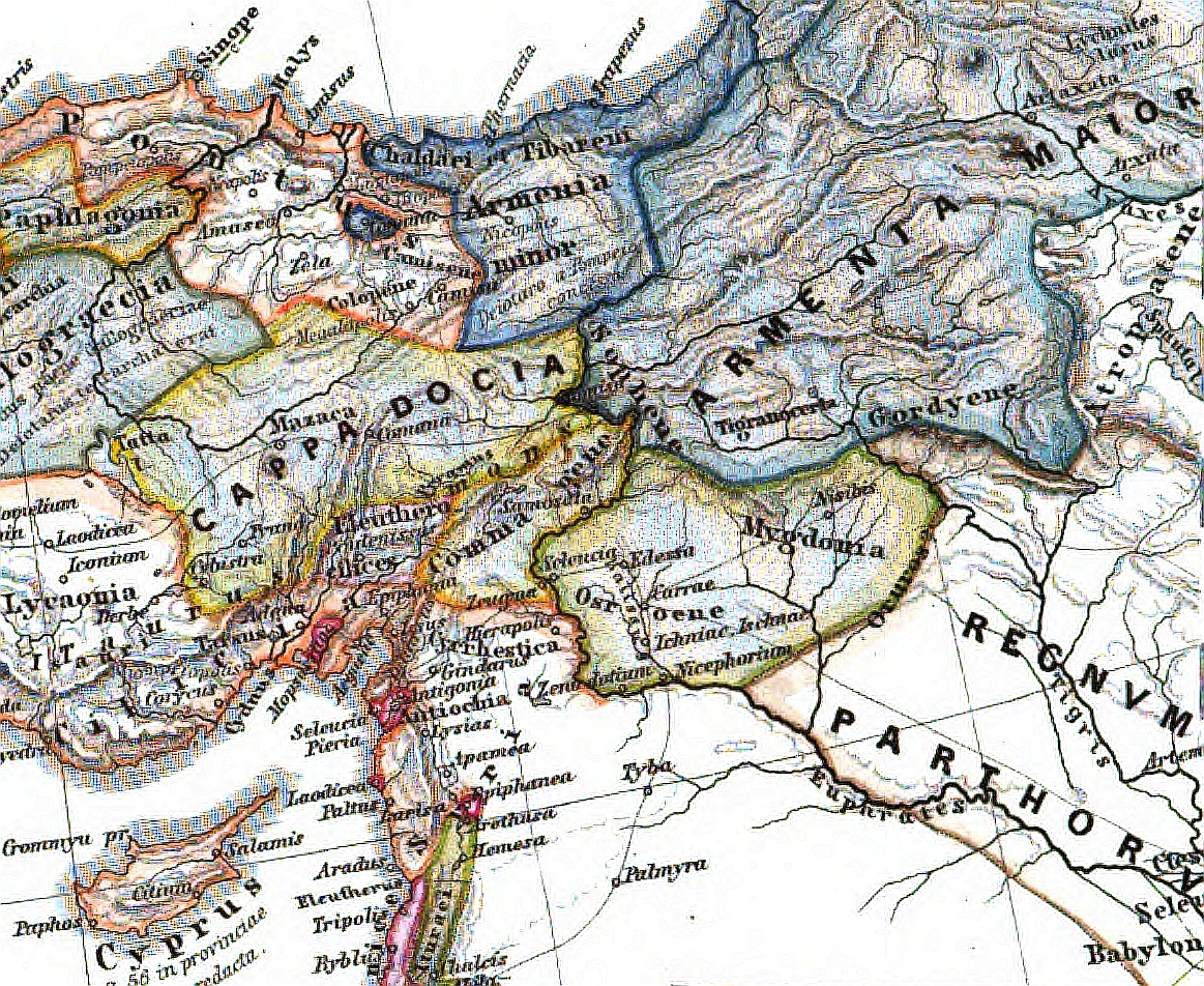 Landkarte von Kleinarmenien